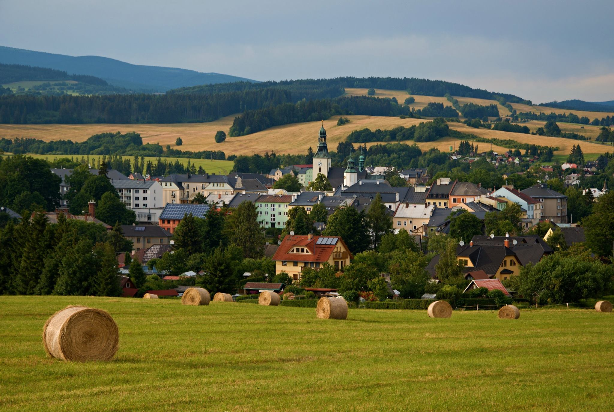 Pohled na Rýmařov z kopce Stráň